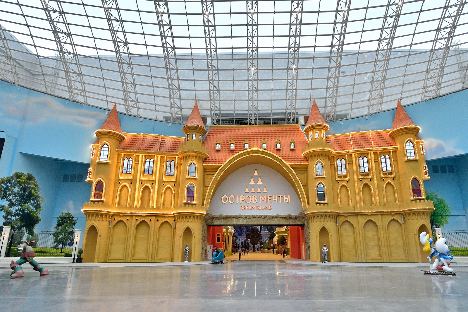 Владимир Путин и Сергей Собянин посетили новый парк развлечений «Остров Мечты»